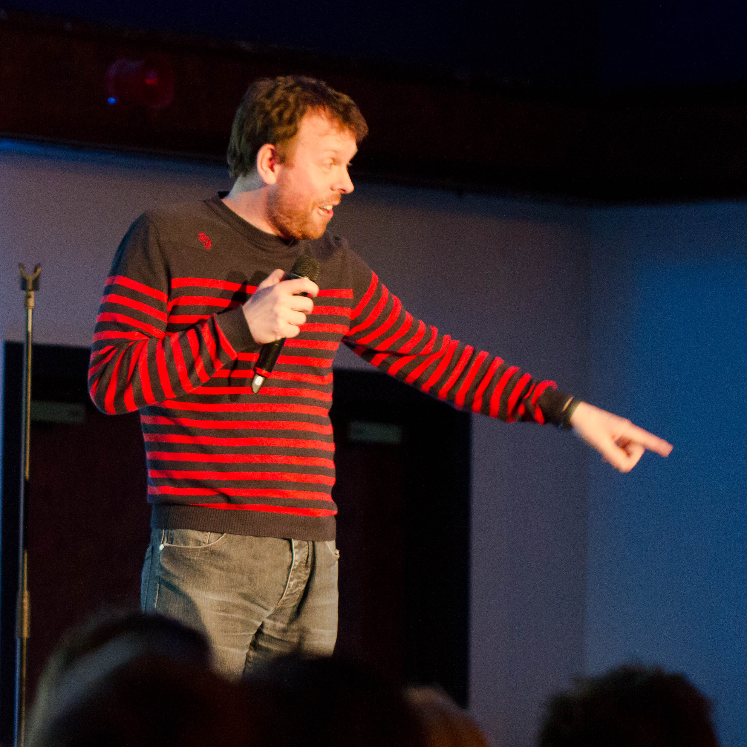 Michael Legge